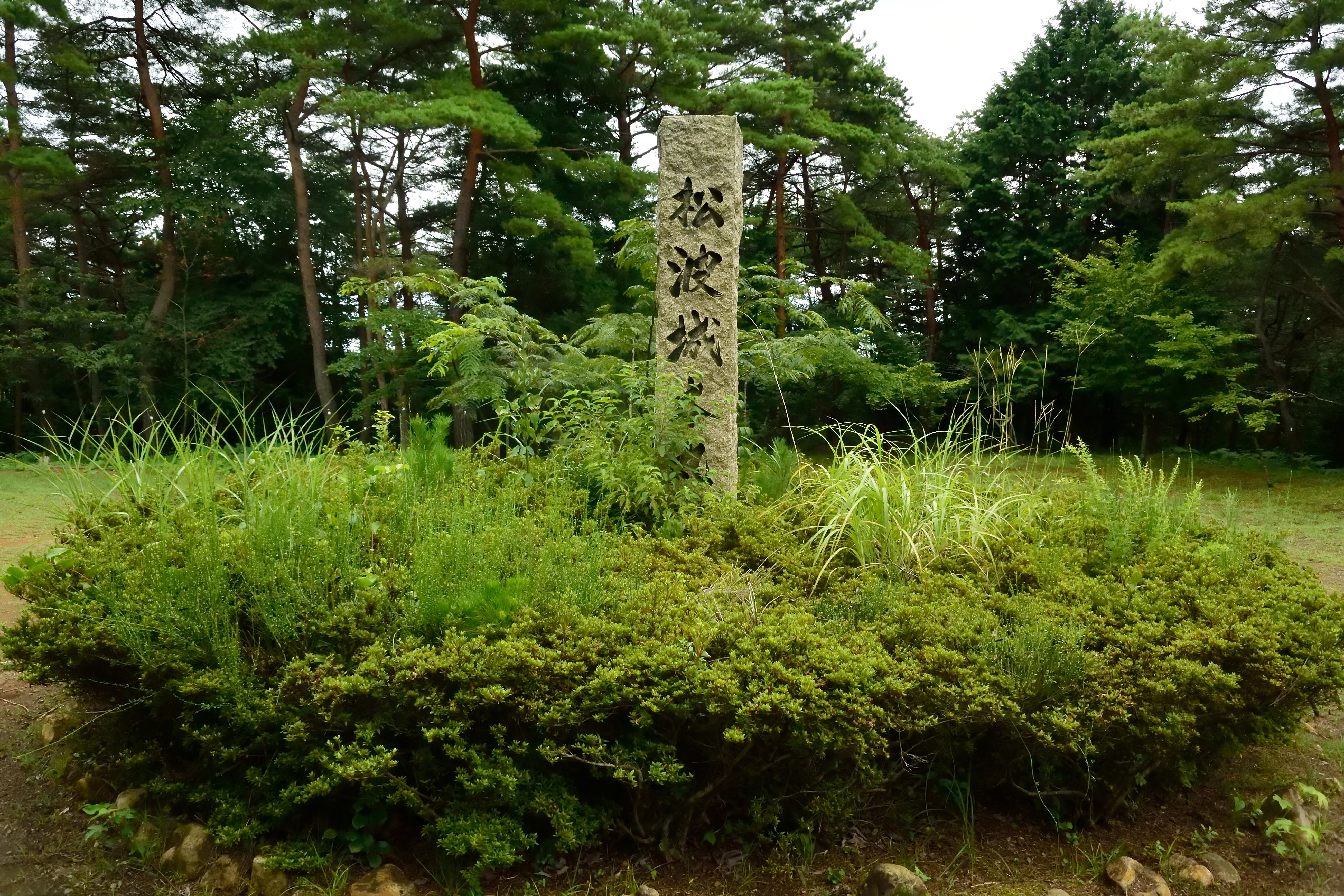 松波城本丸址